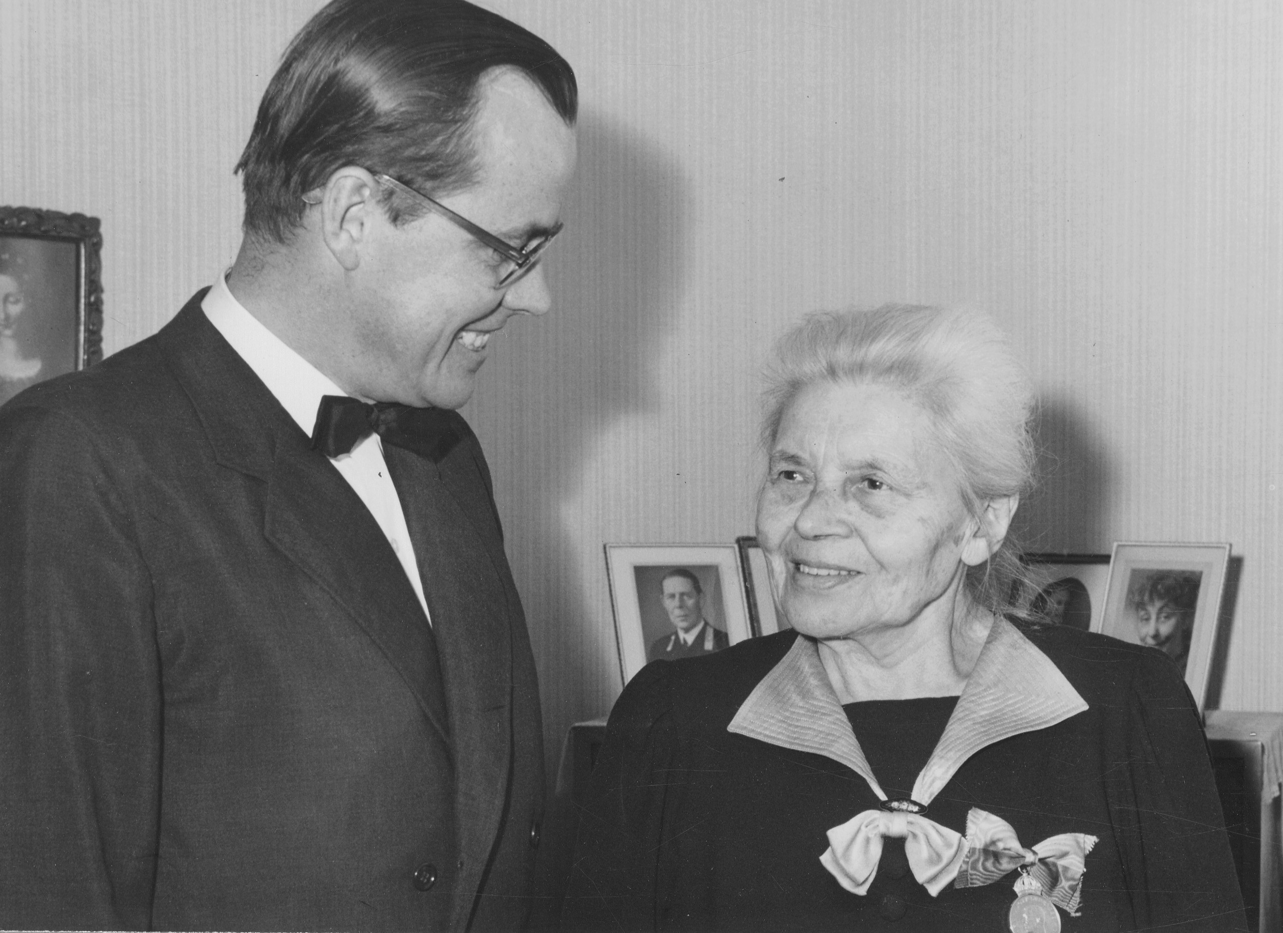 Arkitekt Hans Åkerblad i samspråk med Ida Danielsson på Blomsterfondens nyinvigda vårdhem i Liseberg